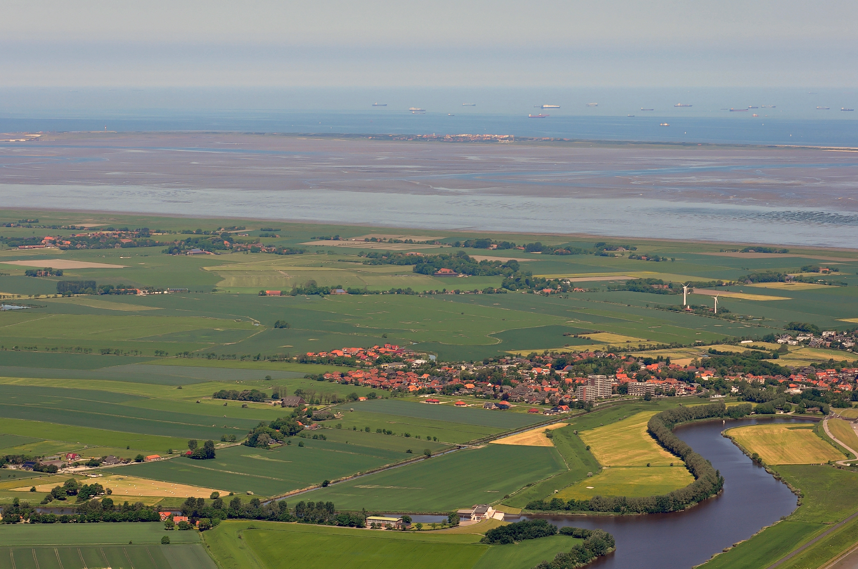 Luftbilder von der Nordseeküste 2012-05